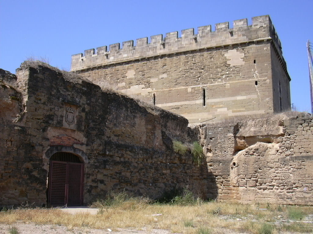 Lérida - Castillo de Gardeny - Portada